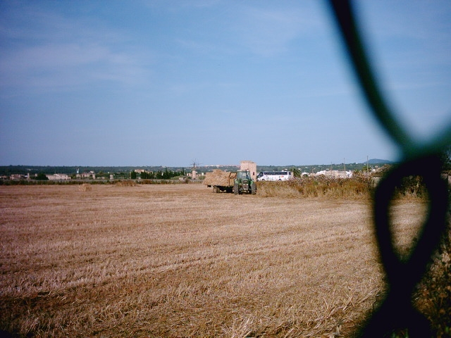 màquina de conreu Autor: Plàcid Pérez Bru.